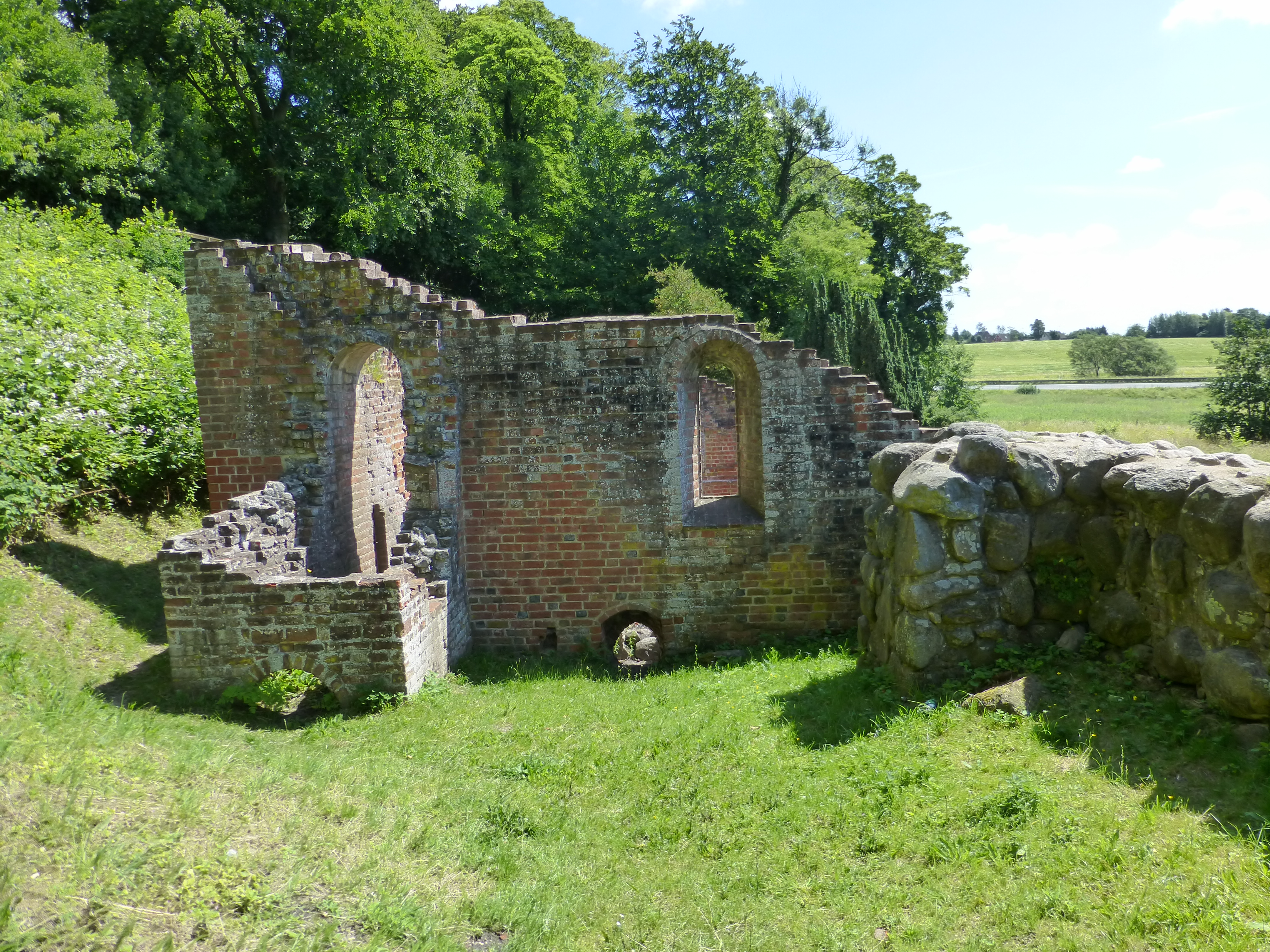 Ruinerne 2012